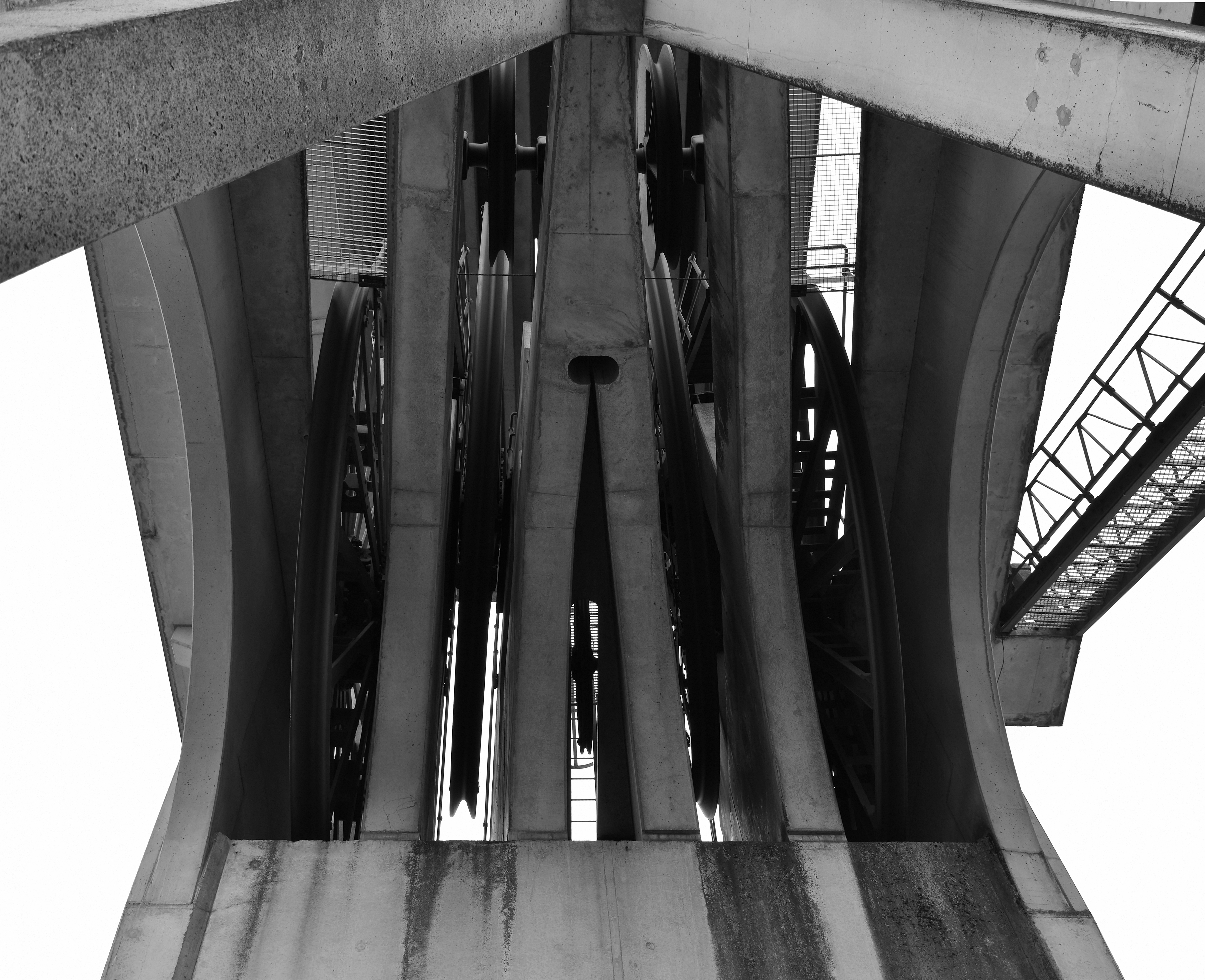 Schachtbok steenkoolmijn van Eisden 18-06-2018 11-44-17 This photo of immovable heritage has been taken in the Flemish Region